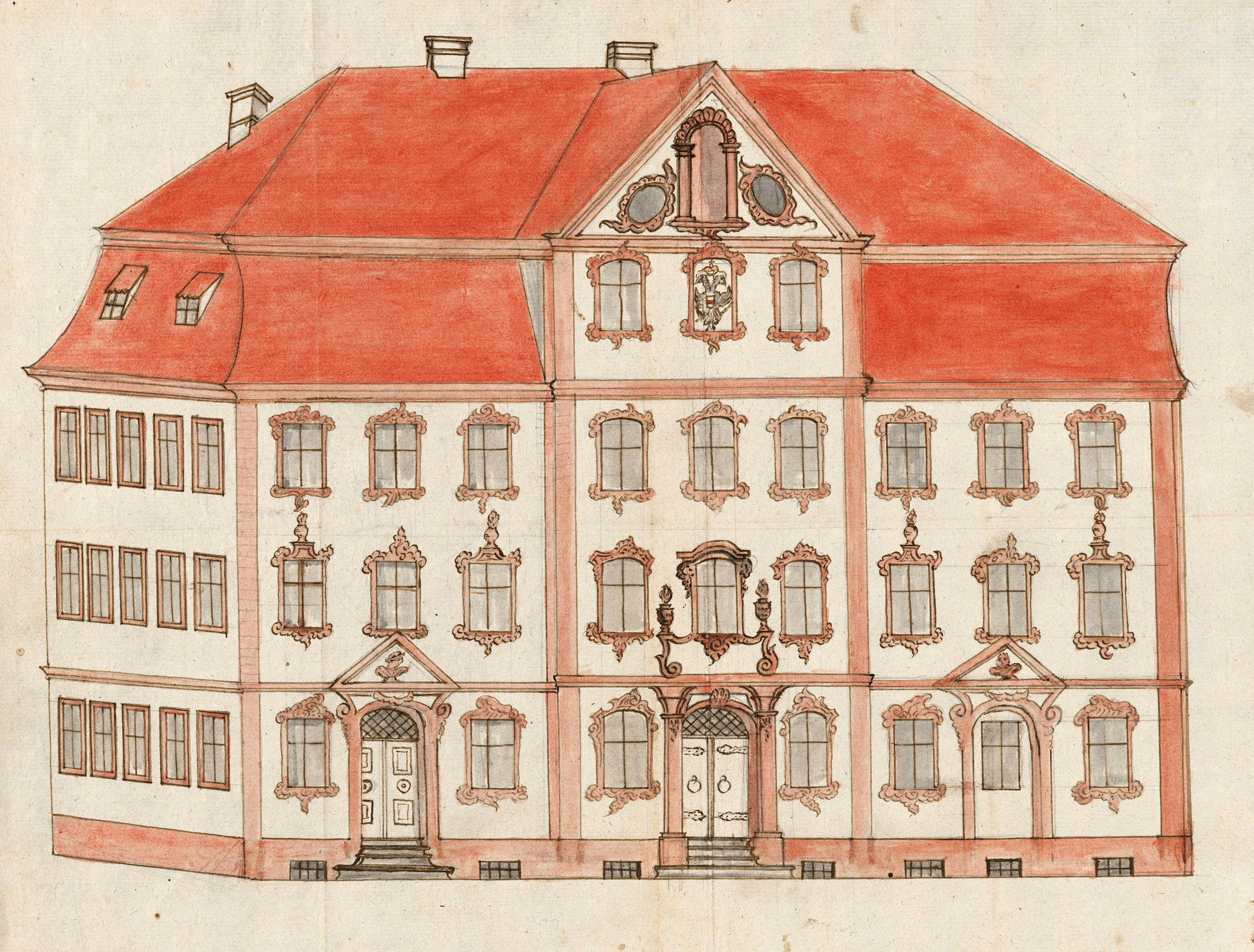 Das Ständehaus in Ehingen, um 1769 (GLAK 79 P 10 K 3)